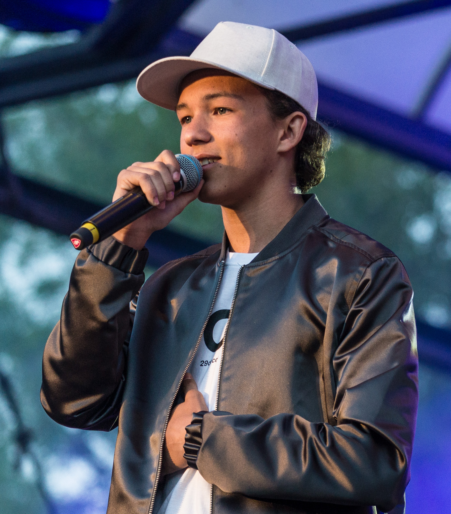 Frans in Eurovision Village in Stockholm, May 11, 2016.